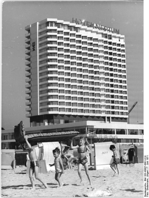 Warnemünde, Hotel "Neptun", Strandbad, Zentralbild Sindermann 7.6.71 Bez. Rostock: Neue Gastronomische Perle des Ostseebezirkes. Das neue, unmittelbar hinter den Dünen der Ostsee gelegene HO-Hotel "Neptun" in Rostock-Warnemünde eröffnete am 7.6.71 seine Pforten. 715 Betten und 1400 Plätze in Gaststätten mit vorwiegend seemännischem Milieu stehen den Gästen zur Verfügung.